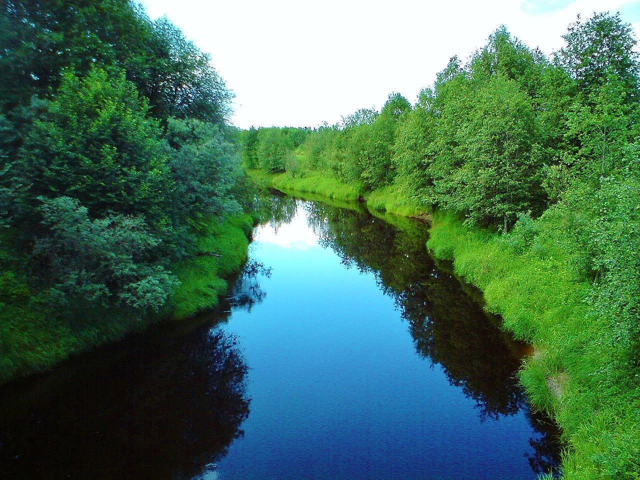 Река Янега